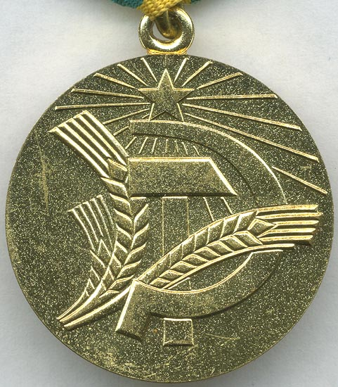 Медаль «За преобразование Нечерноземья РСФСР». Обратная сторона